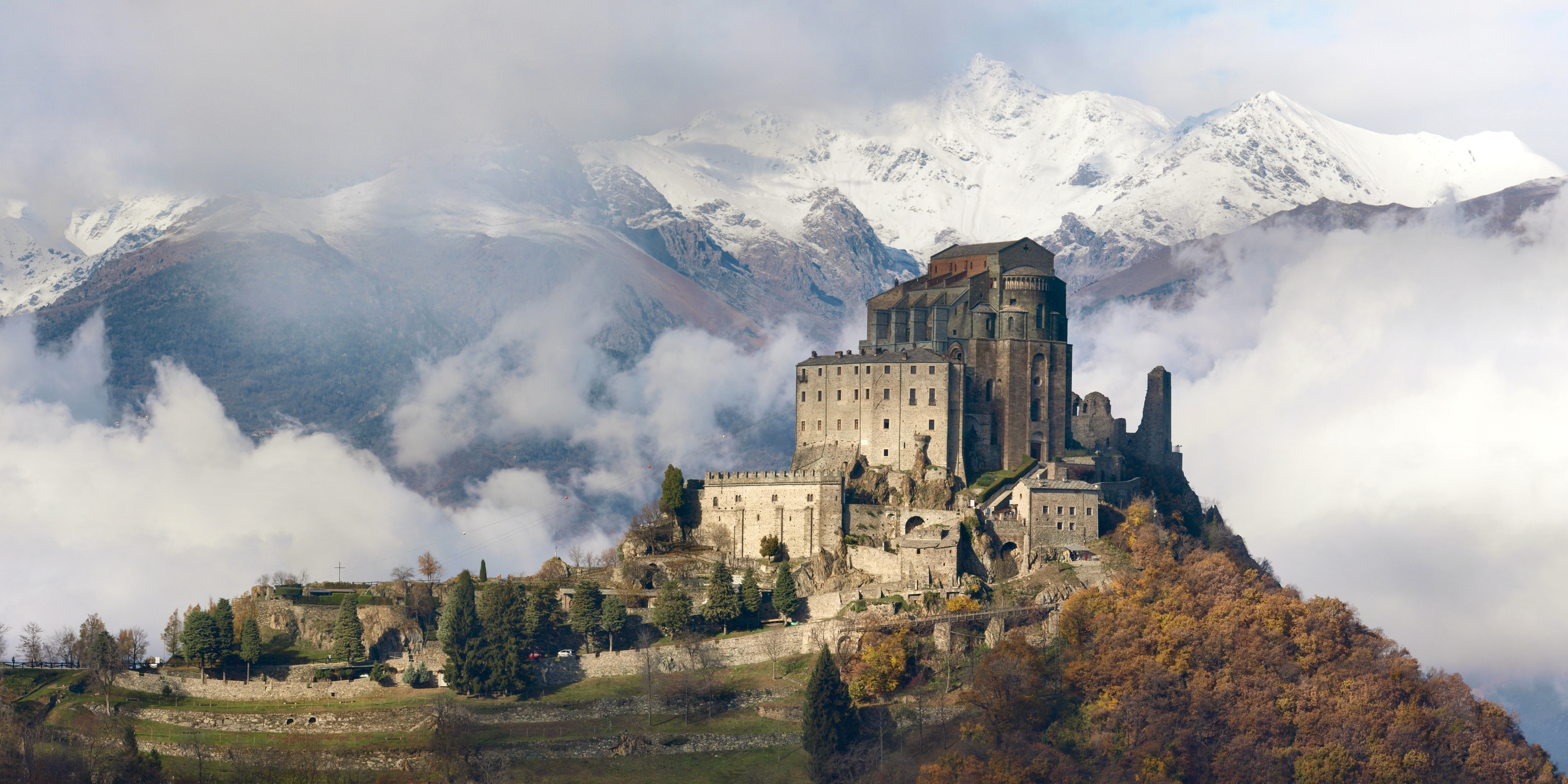 Sacra di San Michele This is a photo of a monument which is part of cultural heritage of Italy.